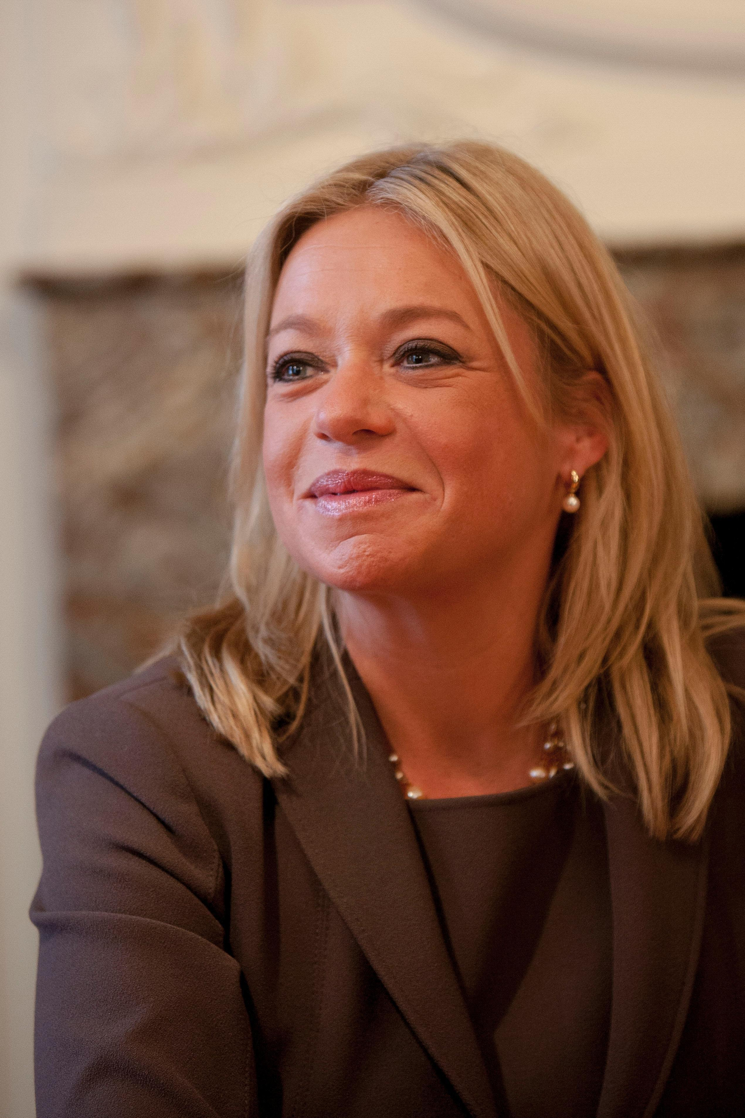 Minister van Defensie Jeanine Hennis-Plasschaert